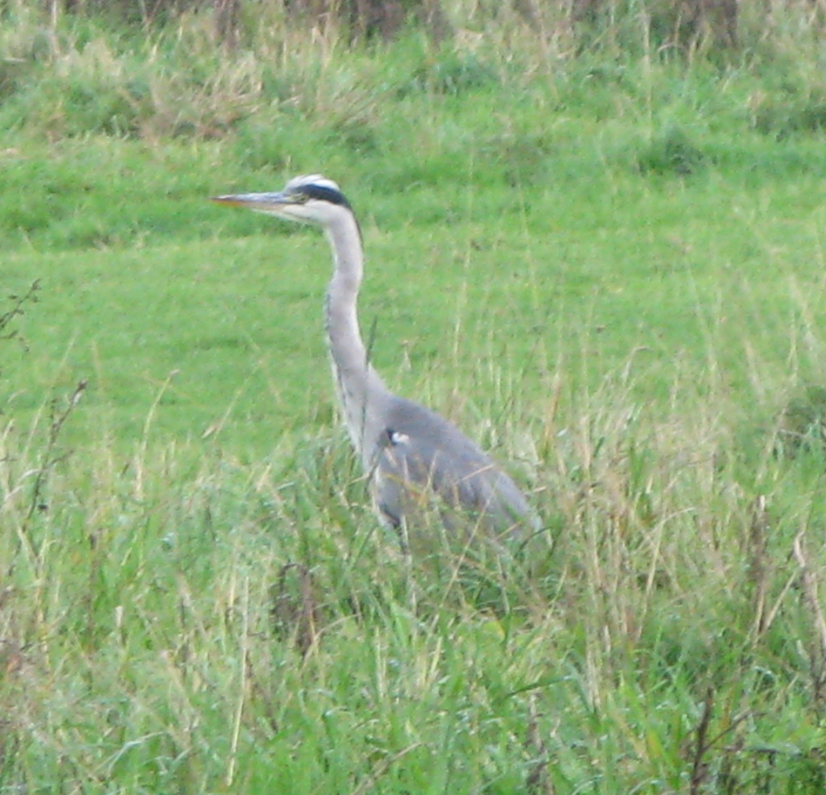 Héron cendré (ardea cinerea), parc du Héron, Villeneuve d'Ascq.